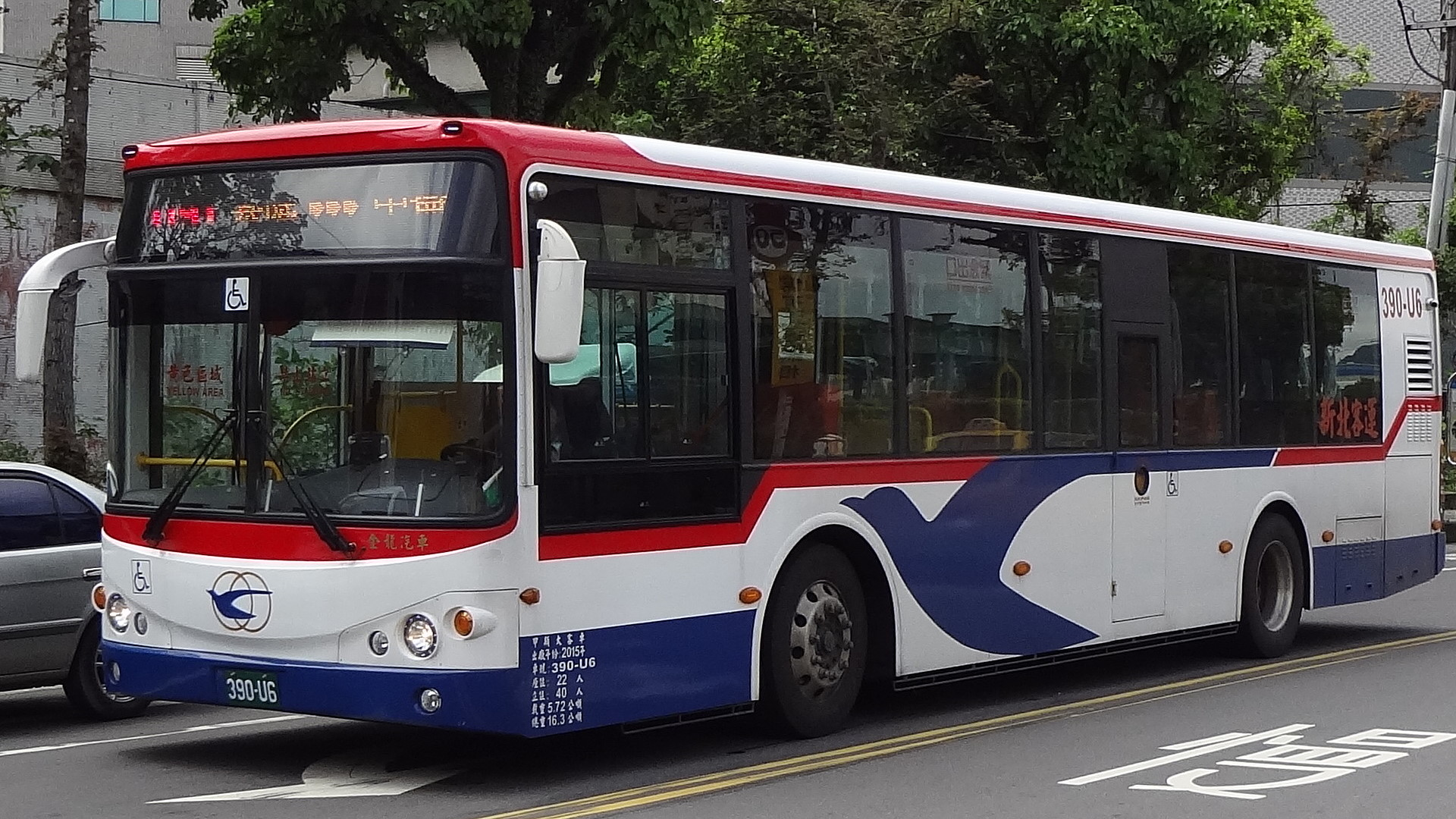 中文（台灣）: 新北客運2015年金龍汽車KL6112U1大客車390-U6，行駛1191線。